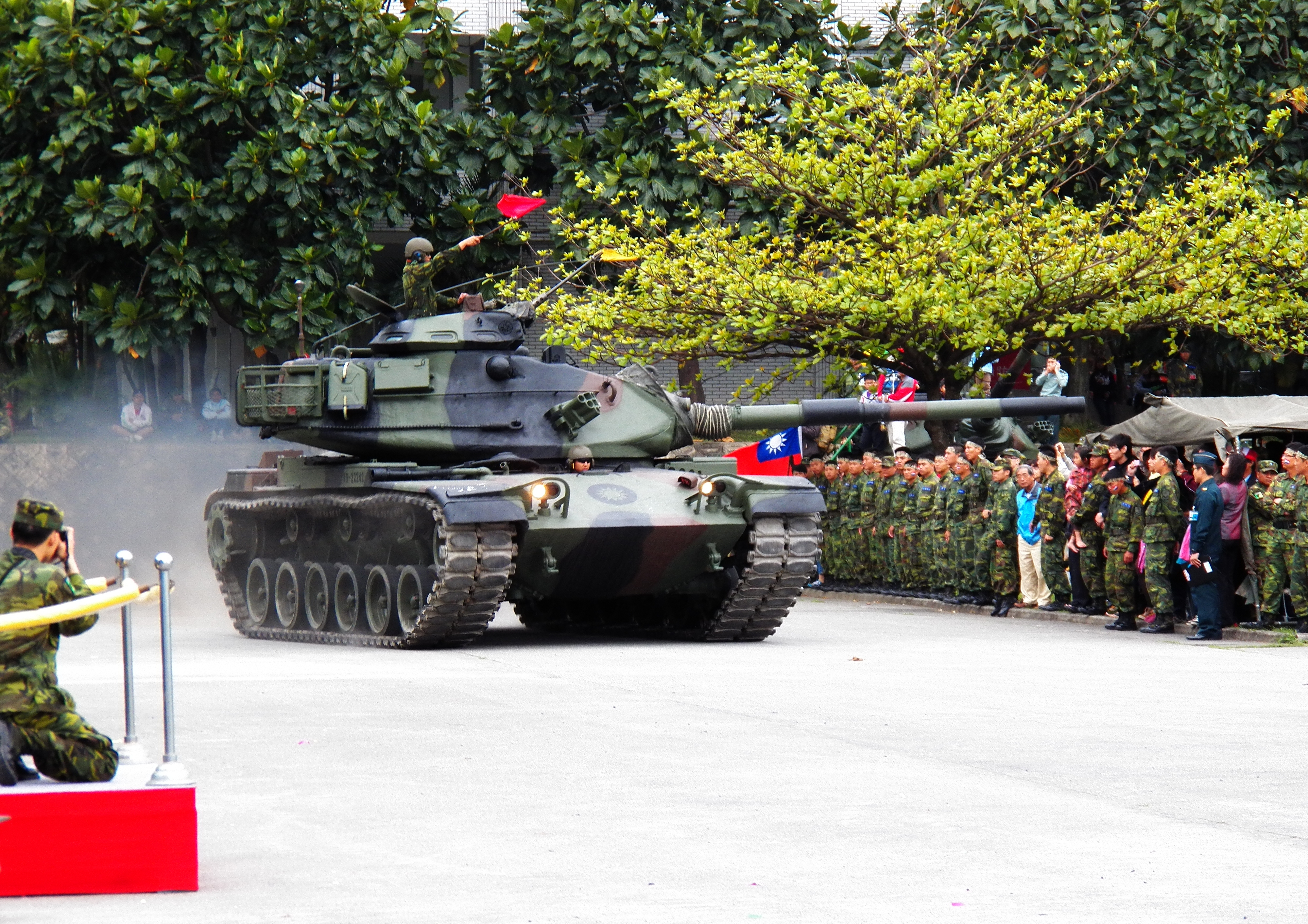 2012年臺東地區指揮部太平營區開放活動，戰備操練開始，砲塔左轉，快速駛入操場的M60A3 TTS。